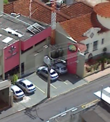 Uma das sede da Rede Vitoriosa/ SBT. Vista a partir do edifício Flat Ilhabella, em Uberlândia.